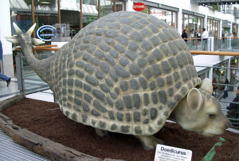 Modell des Doedicurus